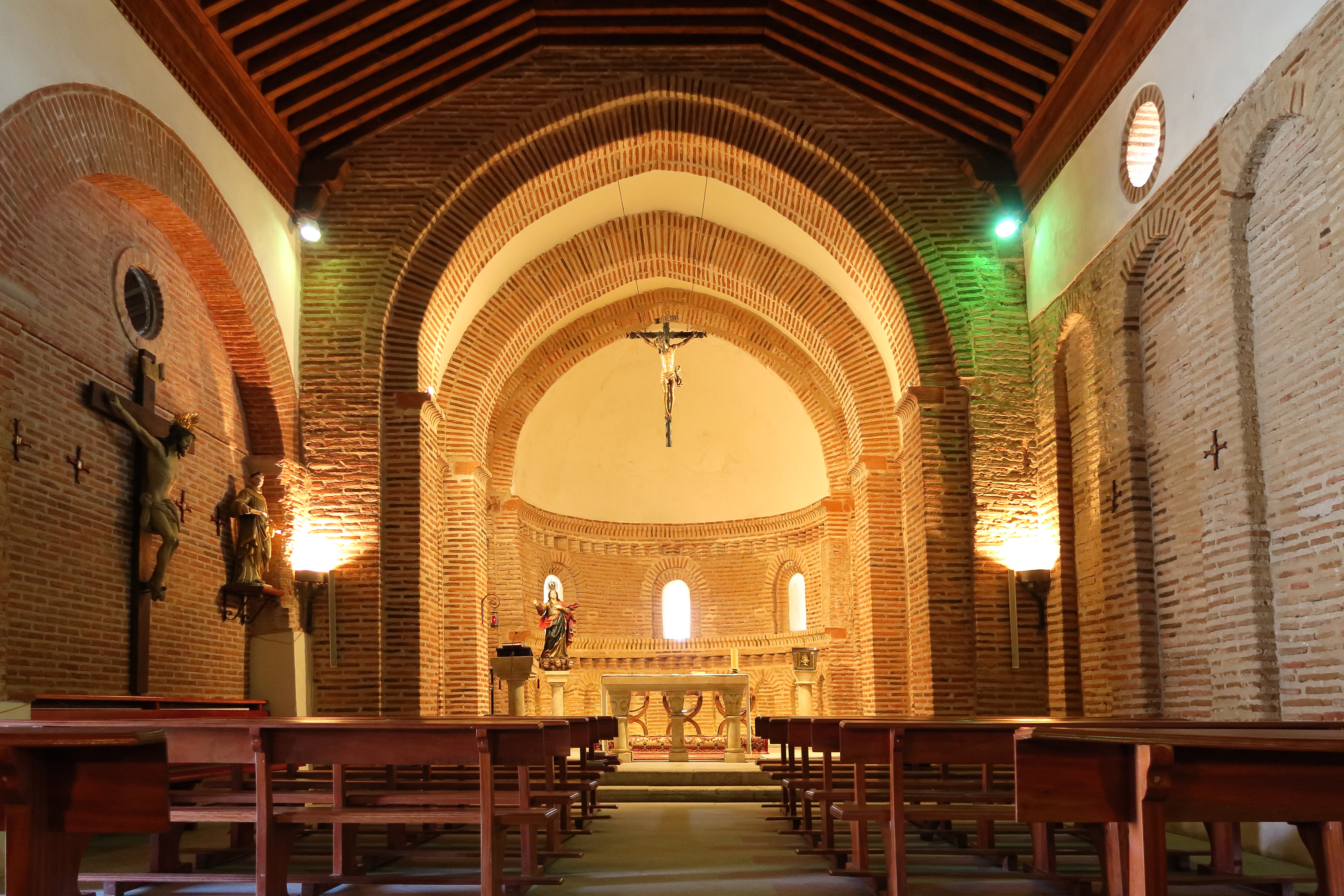 Interior de la Iglesia de Nuestra Señora de la Asunción en Peñarandilla